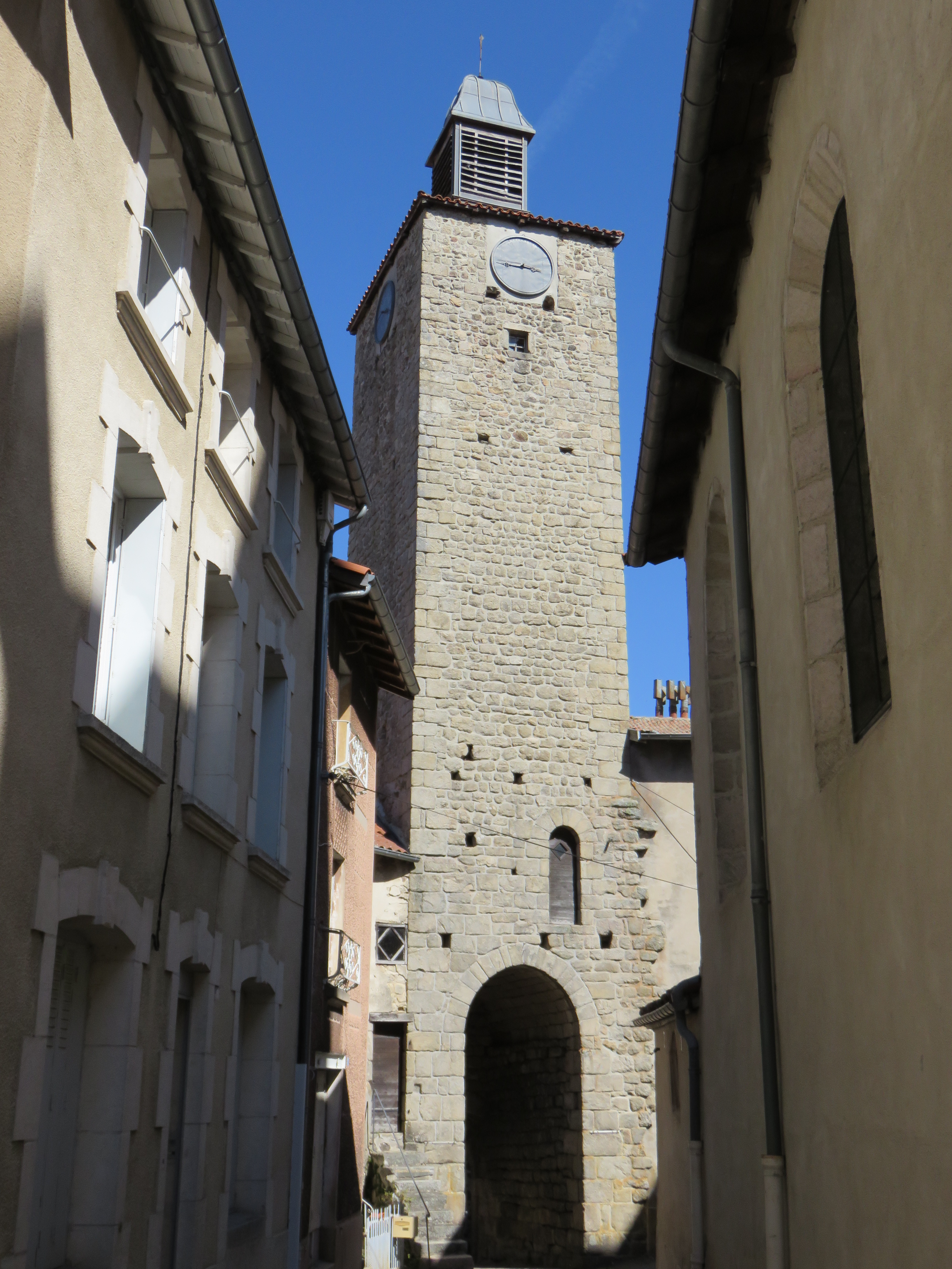 Donjon de Craponne-sur-Arzon (Haute-Loire, France).